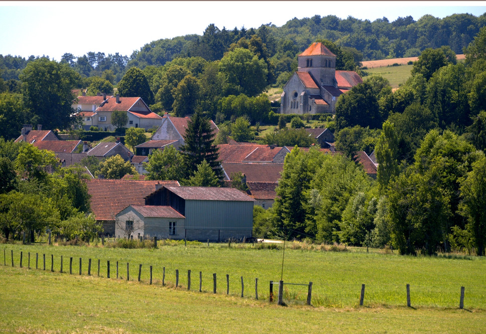 Bay-sur-Aube (Haute-Marne)